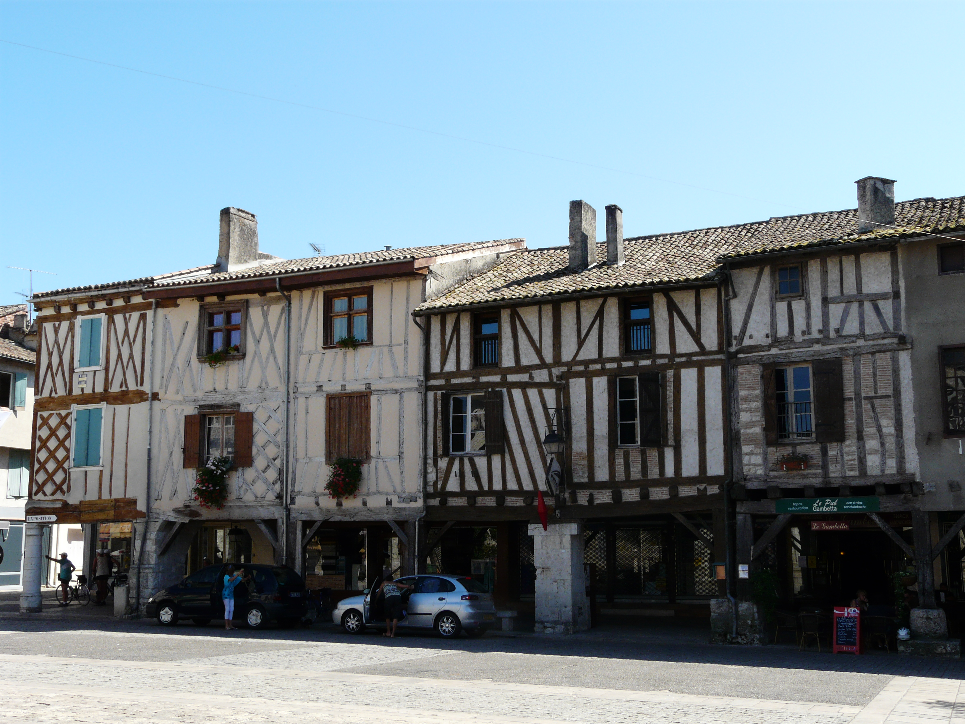 Maisons à colombages de la place Gambetta, Eymet, Dordogne, France